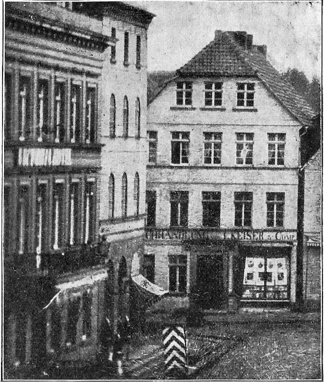 Die alte Hauptwache befand sich am Markt in der späteren Viktoriahalle